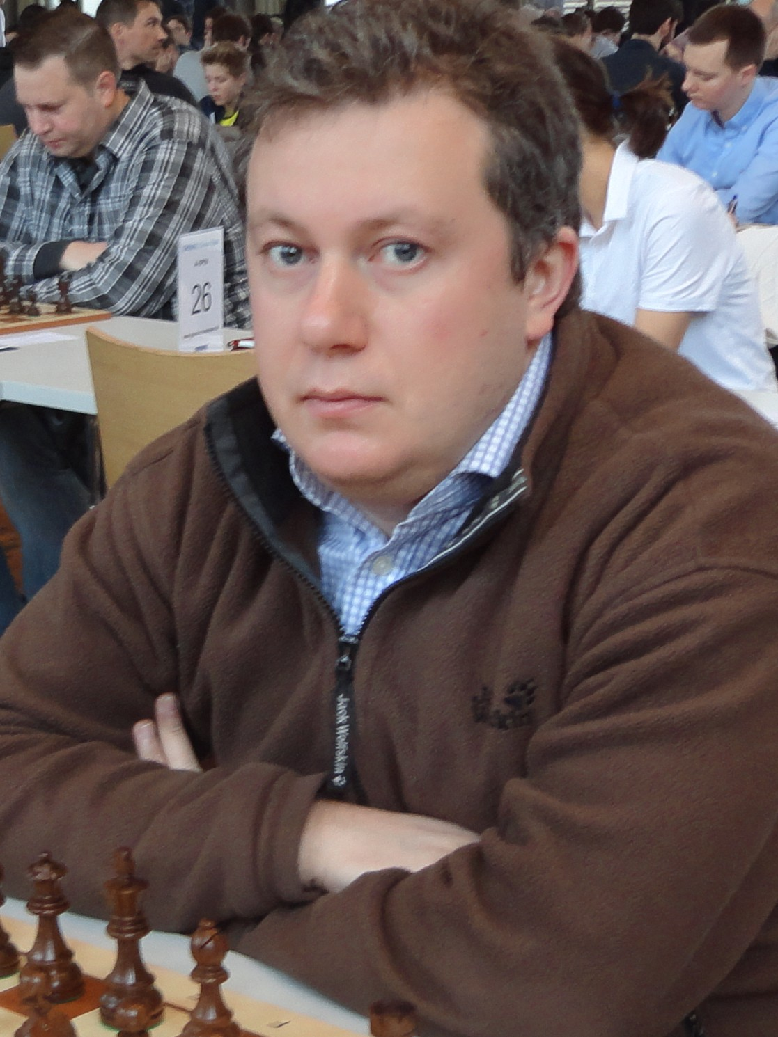 Arkadij Naiditsch, Grenke Chess Open 2016 in Karlsruhe.